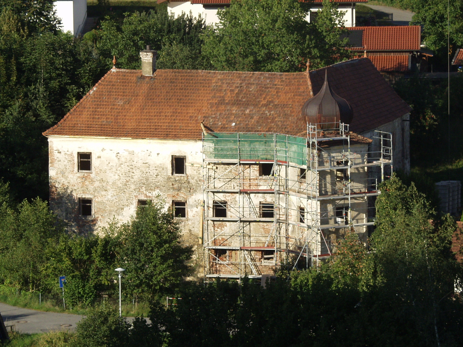 Ehemaliges Schloss Haunkenzell 7″ N, 12° 37′ 32.3″ E